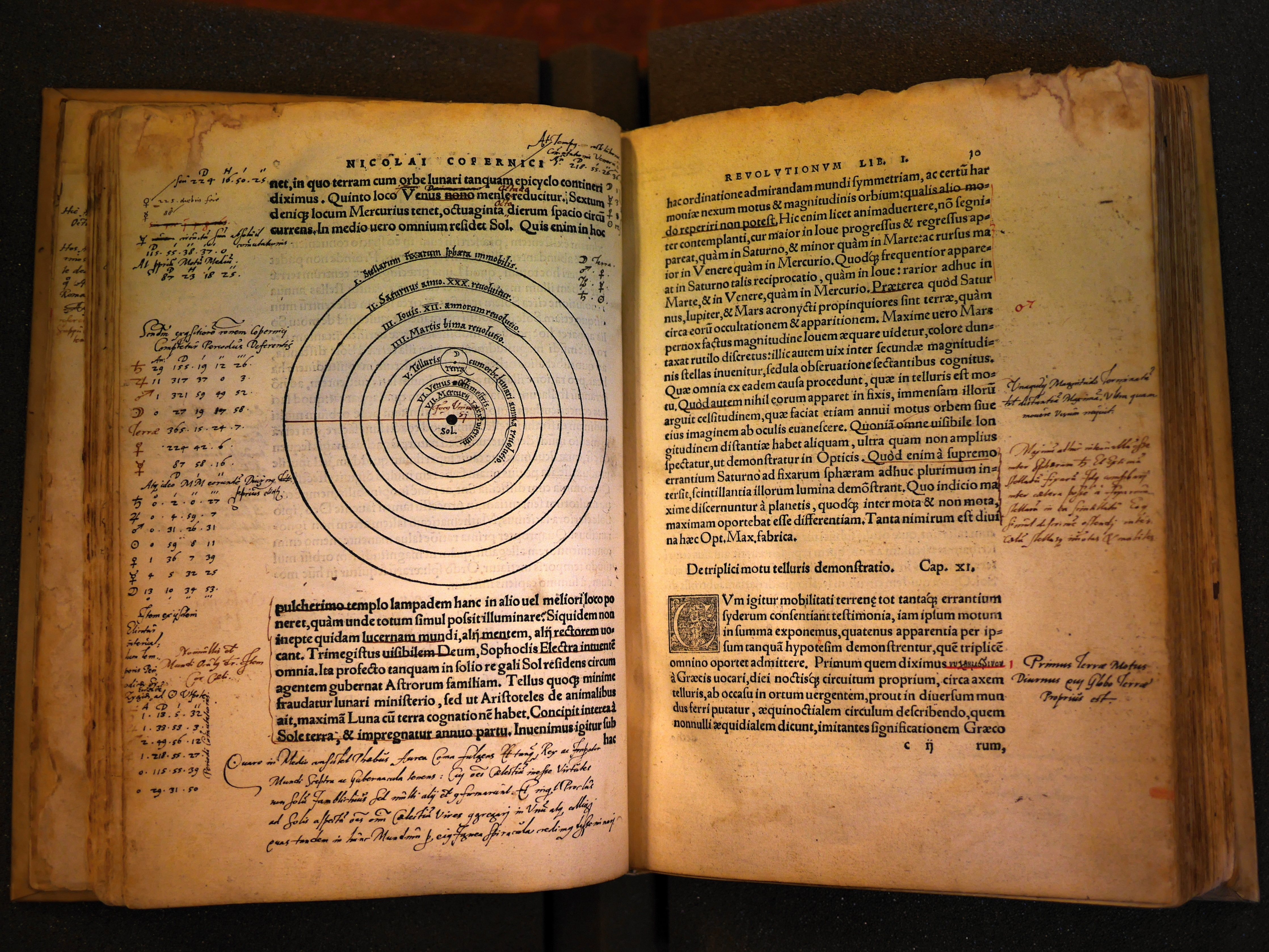 Nicolas Copernic, Nicolai Copernici Torinensis De revolutionibus orbium coelestium, libri IV, Nuremberg, Iohannes Petreius, 1543 (R. 69C, Université de Liège) This is a file created at the museum: Library of Université de Liège